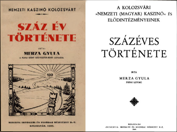 "Nemzeti Kaszinó Kolozsvárt. Száz év története" külső és belső borítója